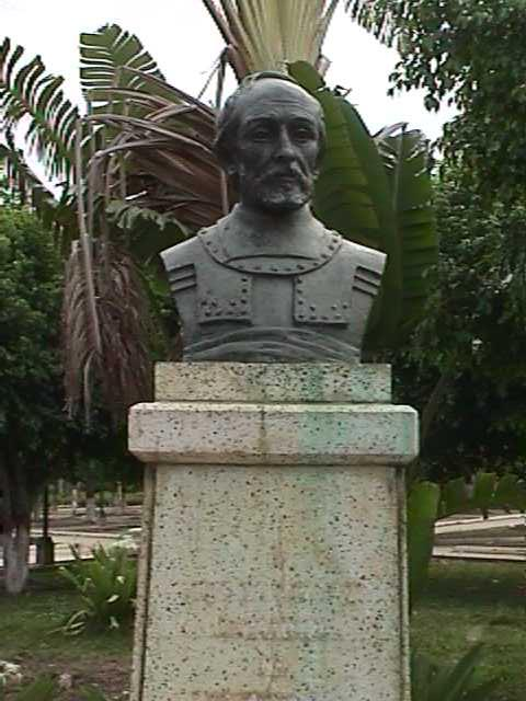 Juan de Carvajal - El Tocuyo, estado Lara - Venezuela (1999)